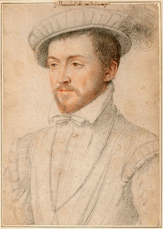 Portrait of François de Montmorency